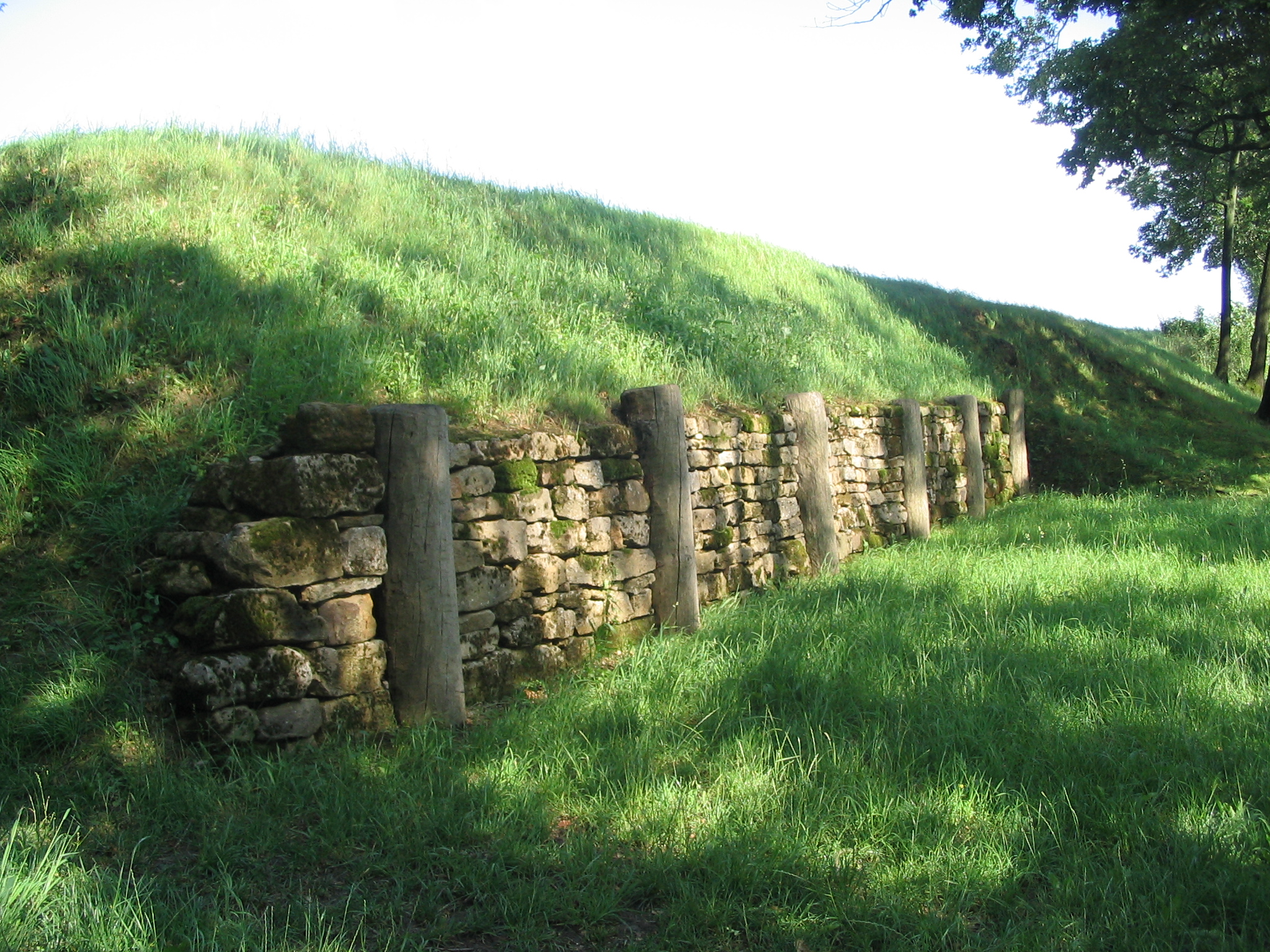 Teilrekunstruktion der Pfostenschlitzmauer des Oppidums Finsterlohr.